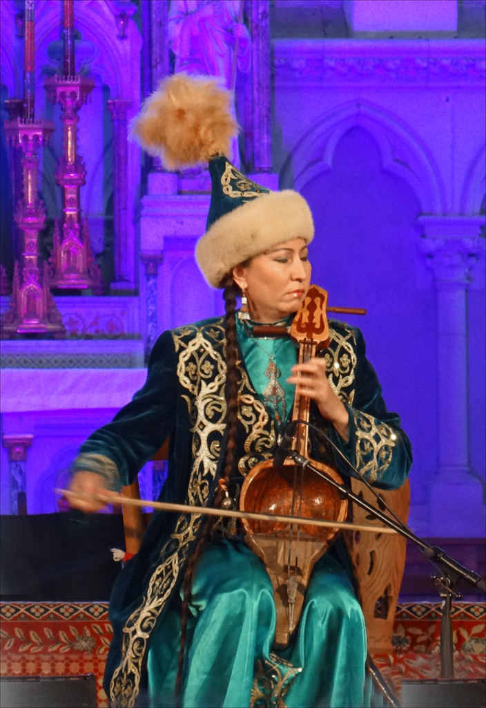 Raushan Urazbayeva à la vièle qyl-qobyz Kazakhstan Article de Wikipedia sur le qobyz ou kobyz: Concert Bardic Divas Les poétesses de l'Asie Centrale Kazakhstan et Ouzbékistan avec la collaboration de l'Aga Khan Music Initiative dans le cadre du festival Les Orientales Musiques et traditions d'Orient Saint-Florent-le-Vieil